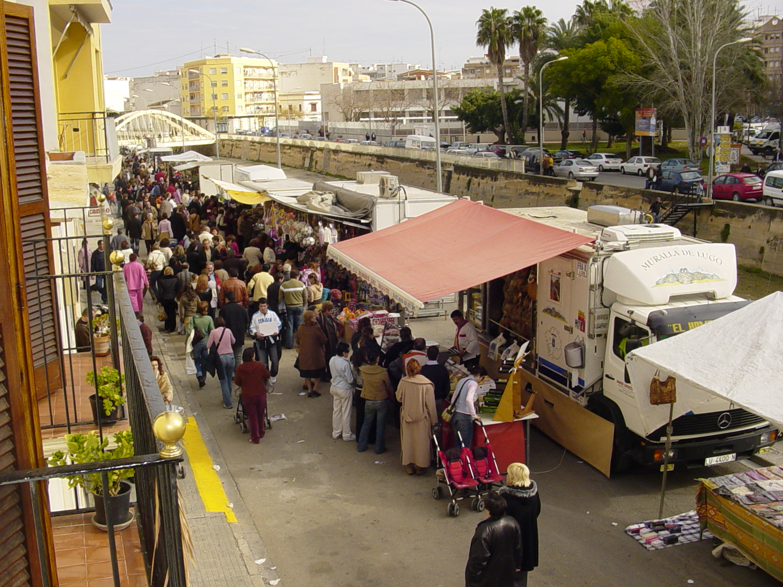 Vista del porrat de Sant antoni al carrer del Barranc de beniopa